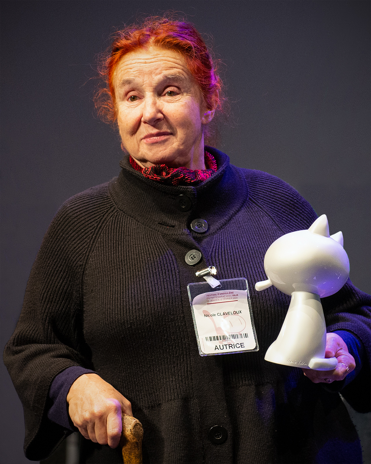 L'artiste Nicole Claveloux avec le Fauve du Patrimoine - Festival International de la Bande Dessinée d'Angoulême 2020.